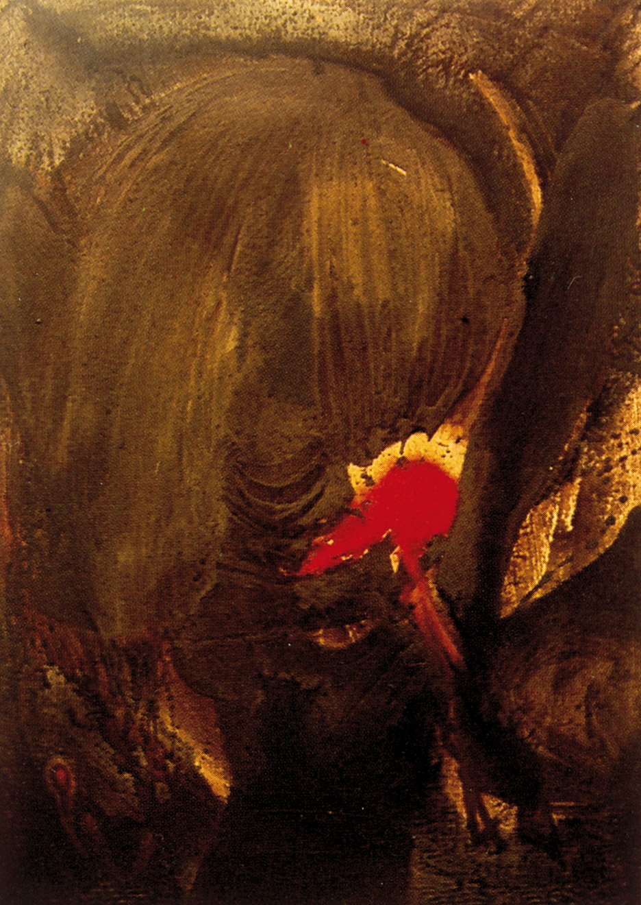 El_Suicida